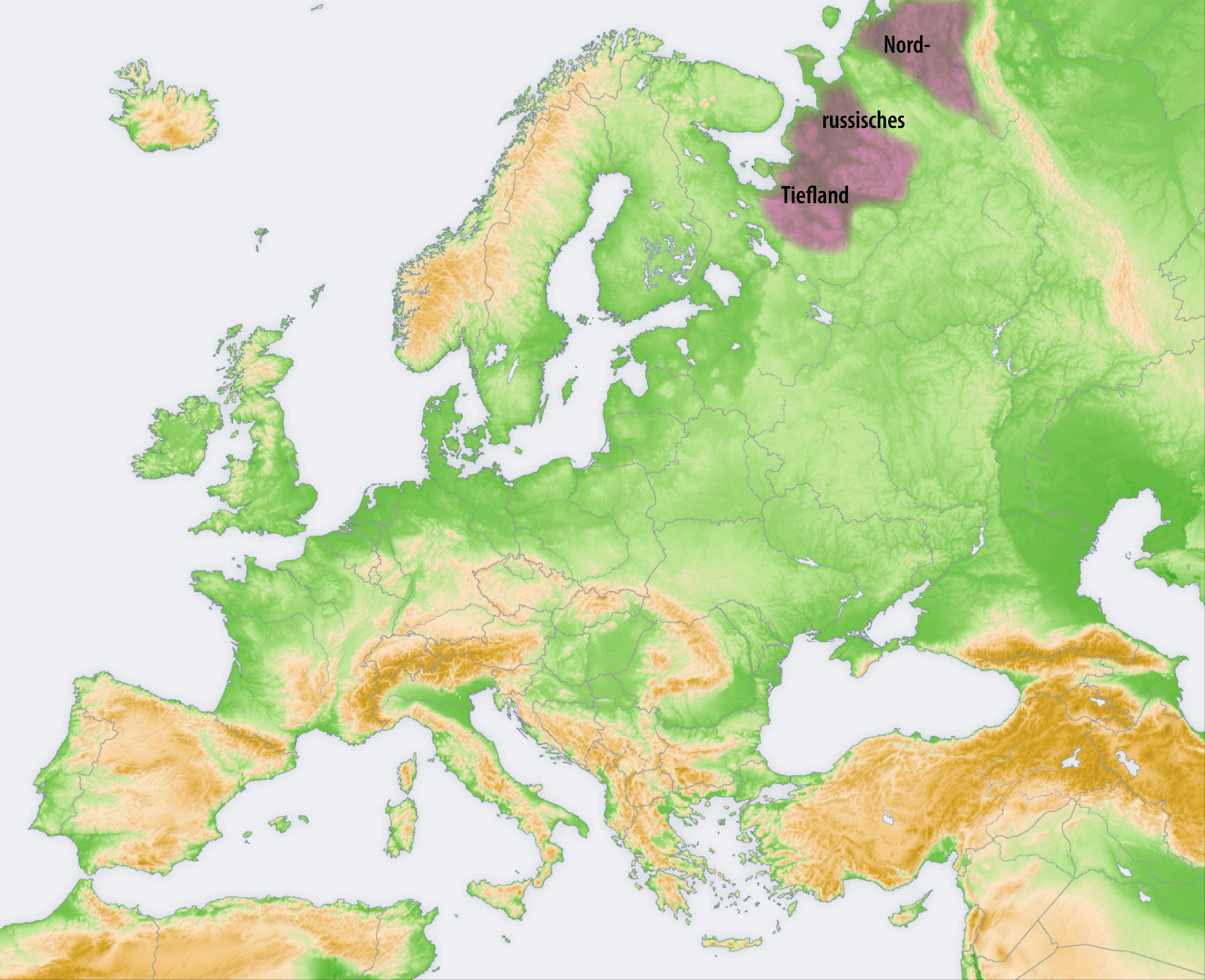 Landschaften der Osteuropäischen Ebene: Nordrussisches Tiefland